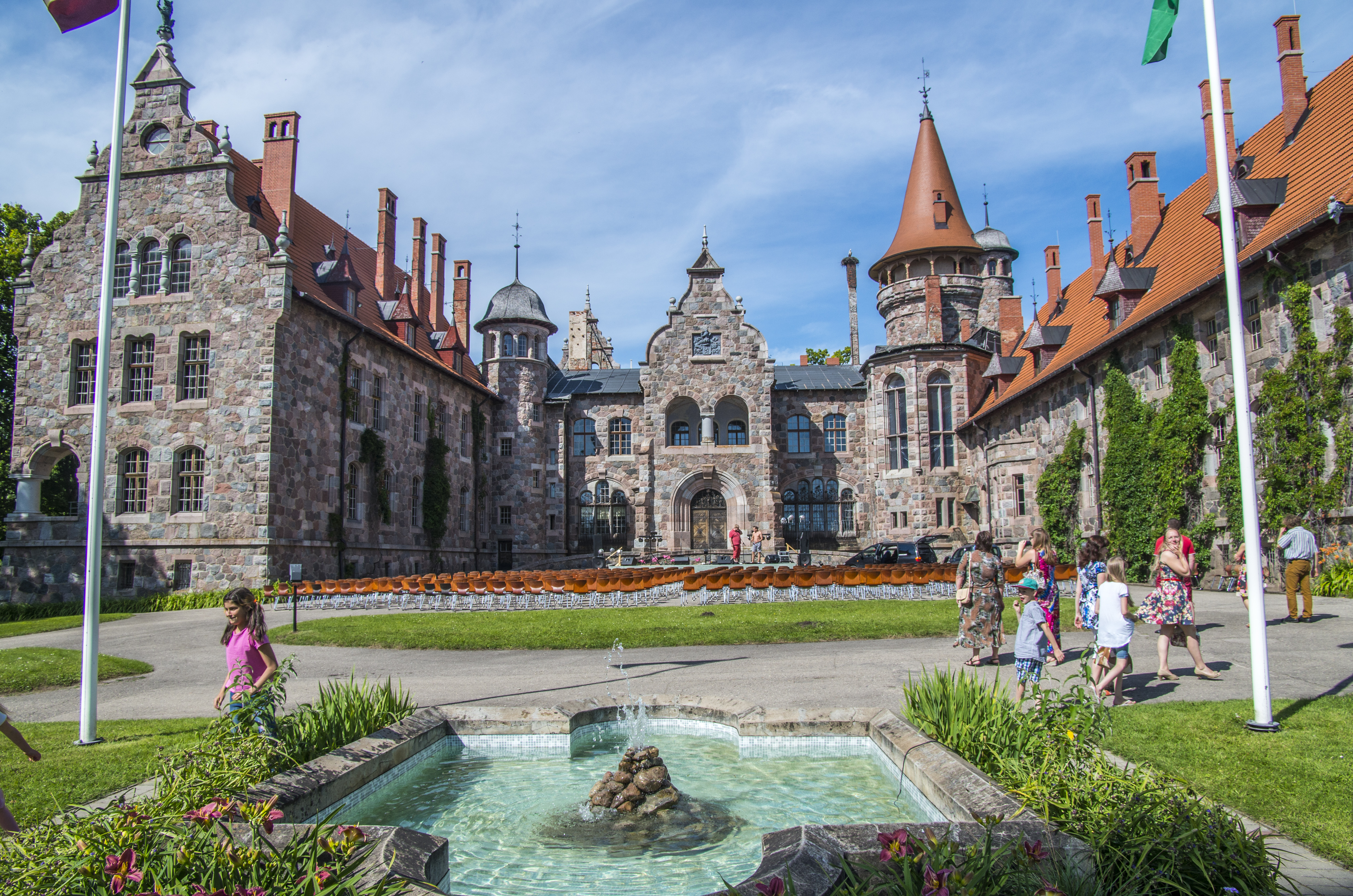 Cesvaines pils